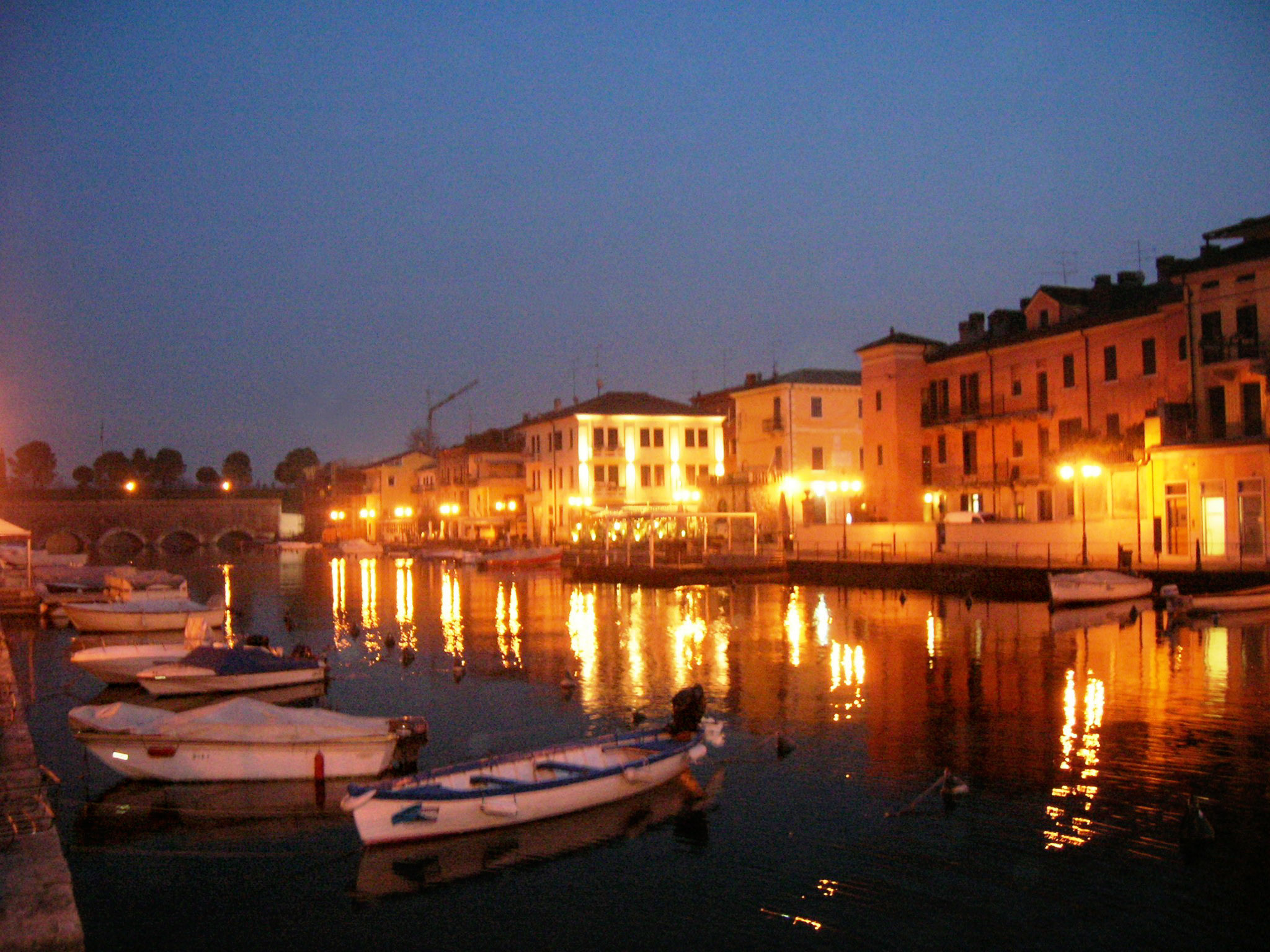 Veduta serale